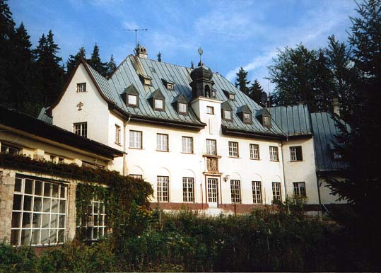 Hotel Krušnohor v Lužci u Nejdku, původně lovecký zámeček z roku 1919